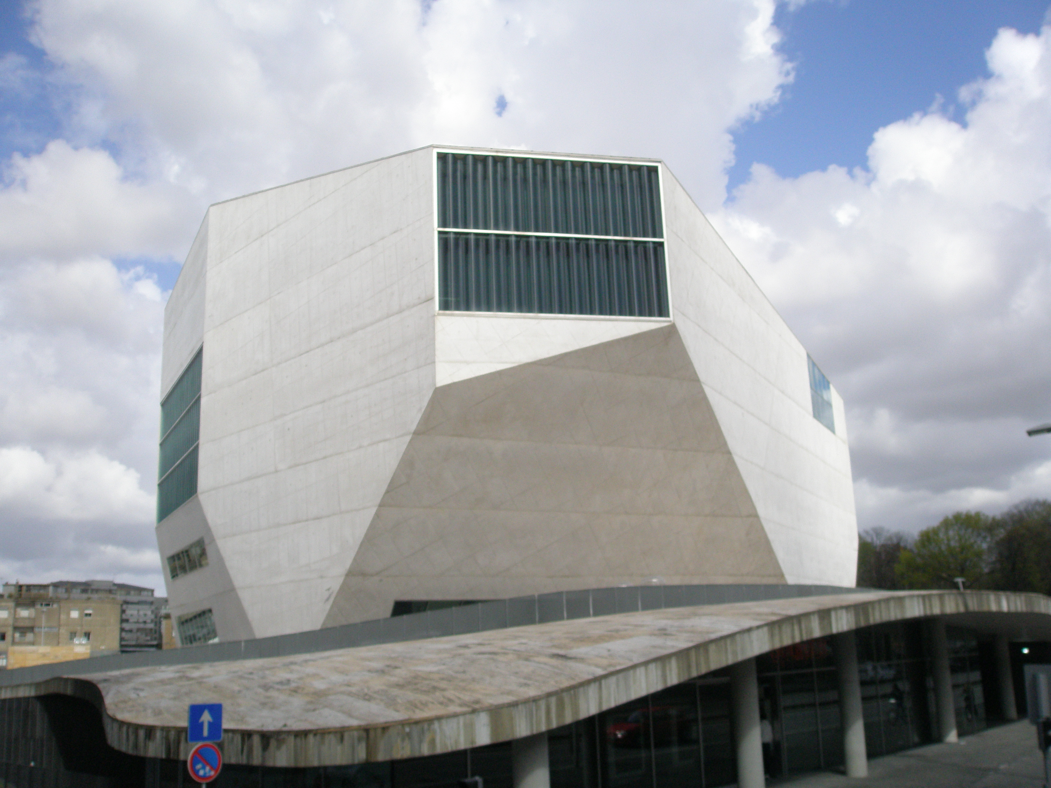 Casa de la Música. La Casa da Música es una sala de conciertos diseñada por el arquitecto holandés Rem Koolhaas, que da cabida a la institución del mismo nombre y las orquestas Nacional do Porto, la Orquestra Barroca y la Remix Ensemble. Su construcción (1999-2005) se encuadró en el proyecto Oporto 2001-Capital Europea de la Cultura.